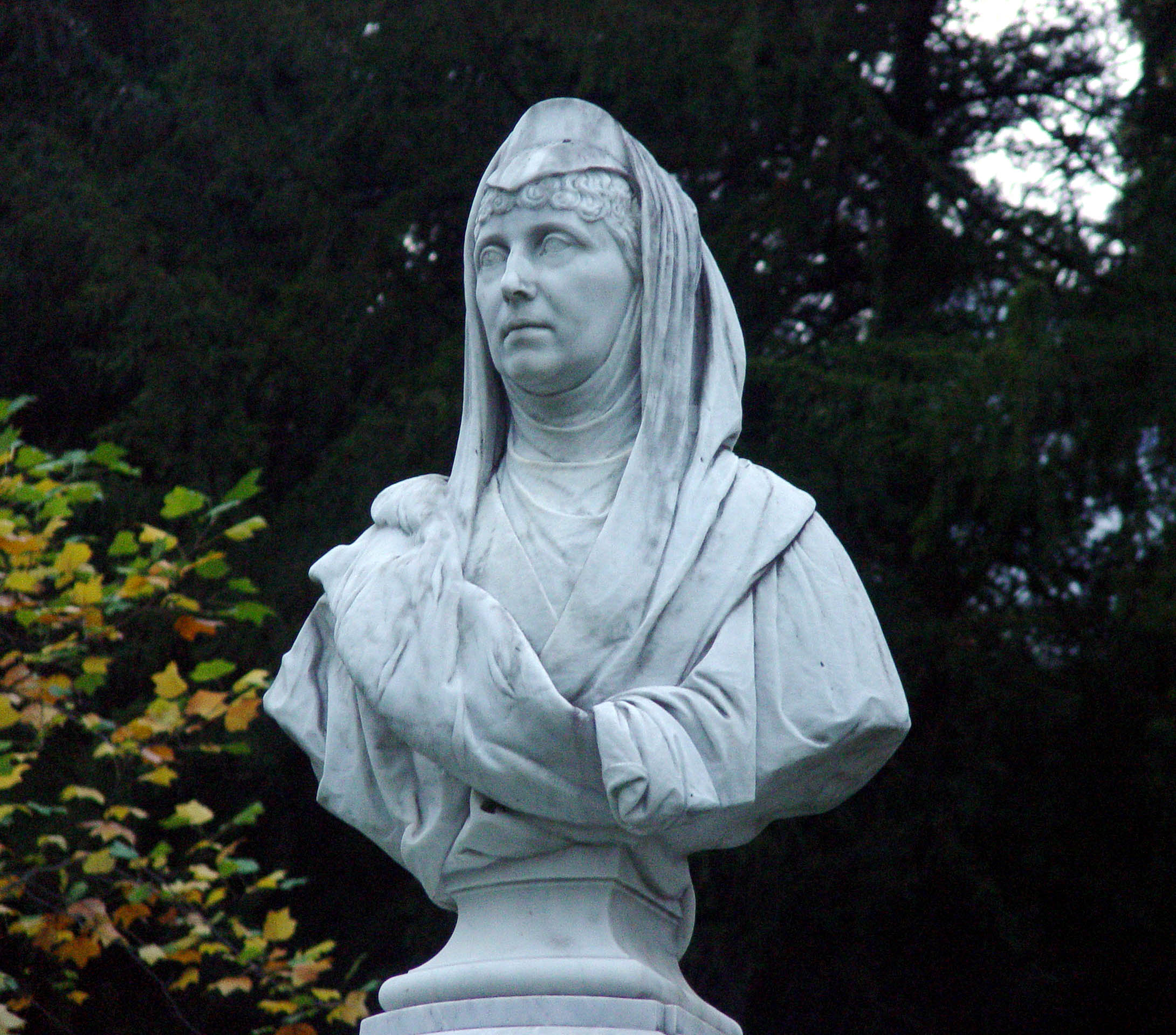 Denkmal der Empress Augusta in Baden-Baden. Kratt 1998: Katalognummer 124b (Kratt 1998 = Regina Kratt: Joseph von Kopf: 1827 - 1903; das Werk des Bildhauers mit typologischen Studien zur Büste und Gruppe, Aachen/Mainz 1998 (zugleich: Karlsruhe, Universität, Dissertation, 1995), ISBN 3-89653-248-0.)